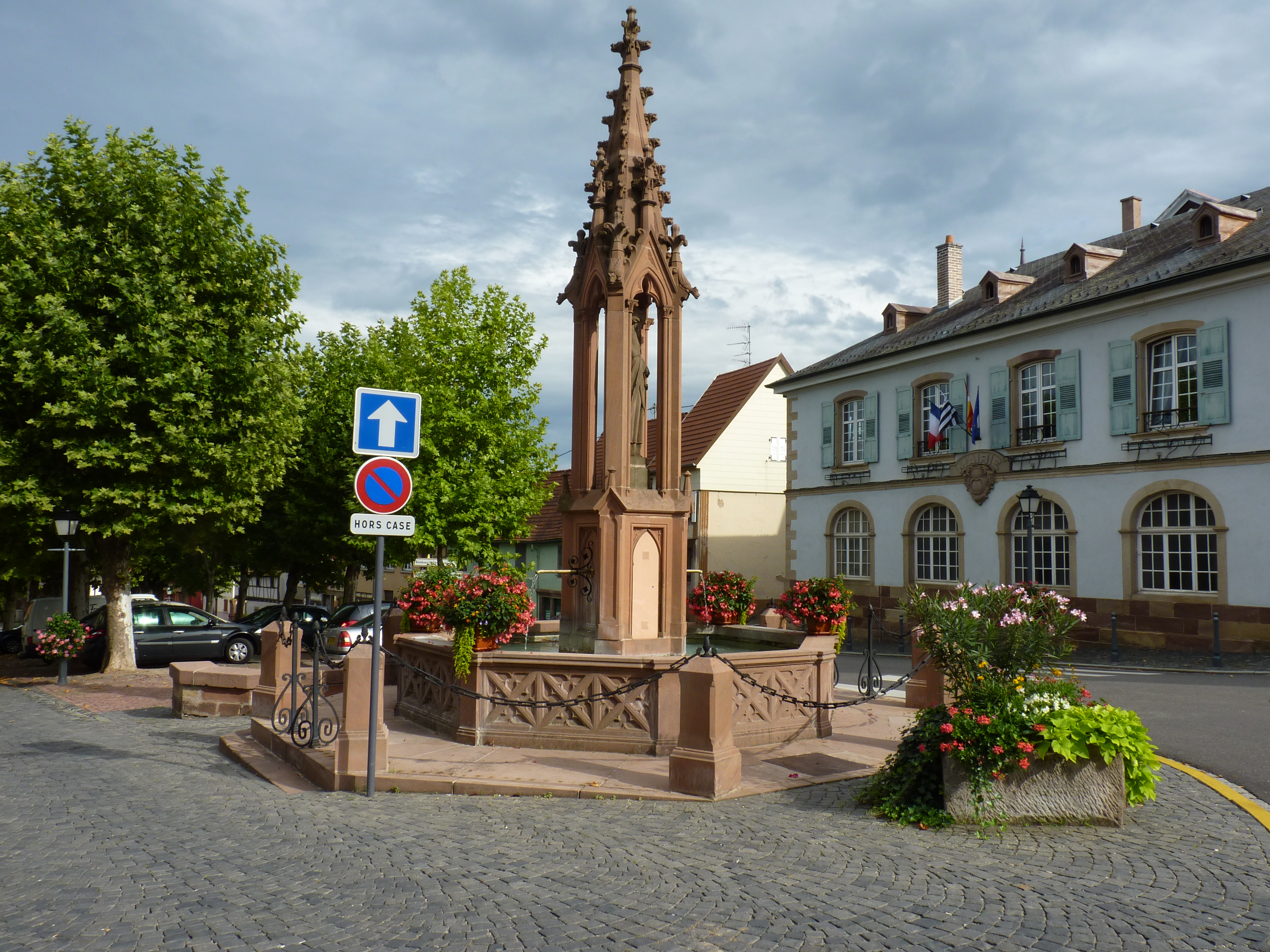 Fontaine Saint-Rémi (XIVe-XIXe siècles)